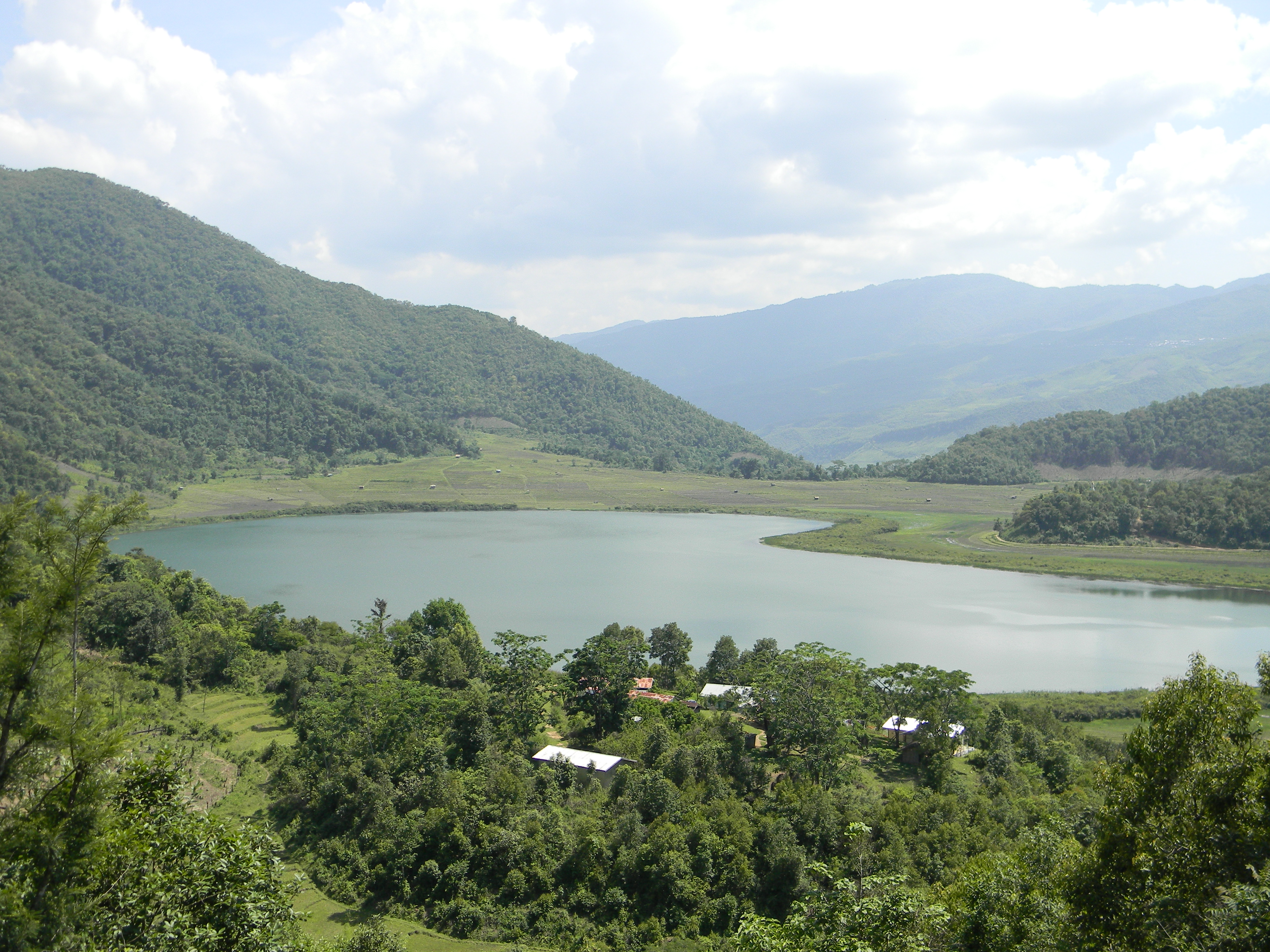 ரிடில் ஏரியானது இந்தோ-பர்மா எல்கையில் அமைந்துள்ளது.பர்மாவின் சின் மாநிலத்தில் ரிக் கோத்தார் என்ற இடத்தில் ரிடில் ஏரி அமைந்துள்ளது.